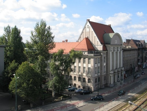 Katowice Bogucice, ul. 1 Maja 50 - dawny Ratusz w Bogucicach, obecnie rektorat Uniwersytetu Ekonomicznego (zabytek nr A/1234/78 z 19.08.1978)